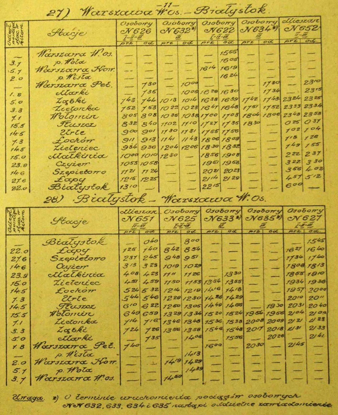 Tabela z rozkładu jazdy z 1919 roku